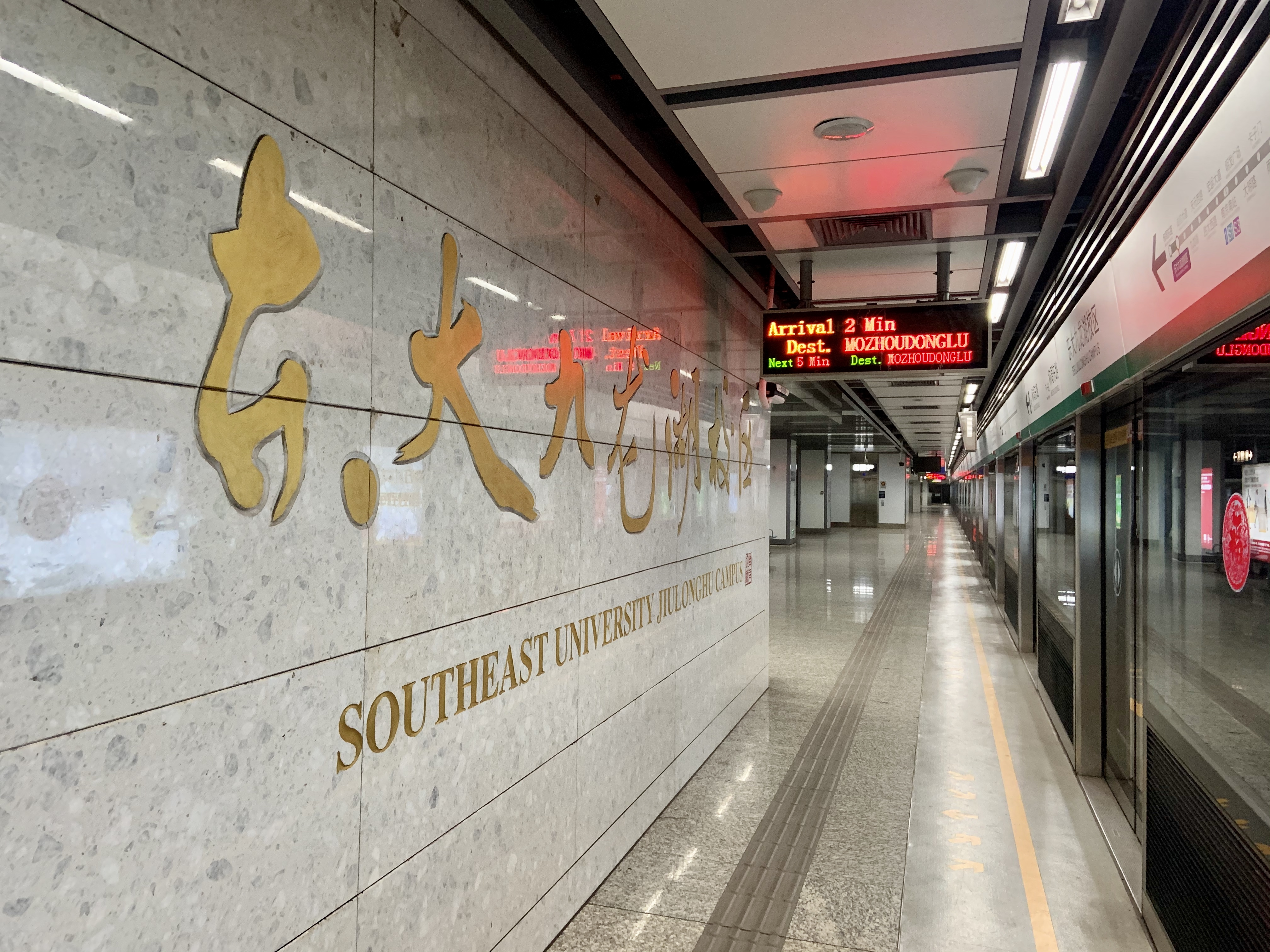 南京地铁东大九龙湖校区站站台层